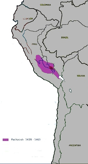 mapa de la expansion del imperio inca, primera